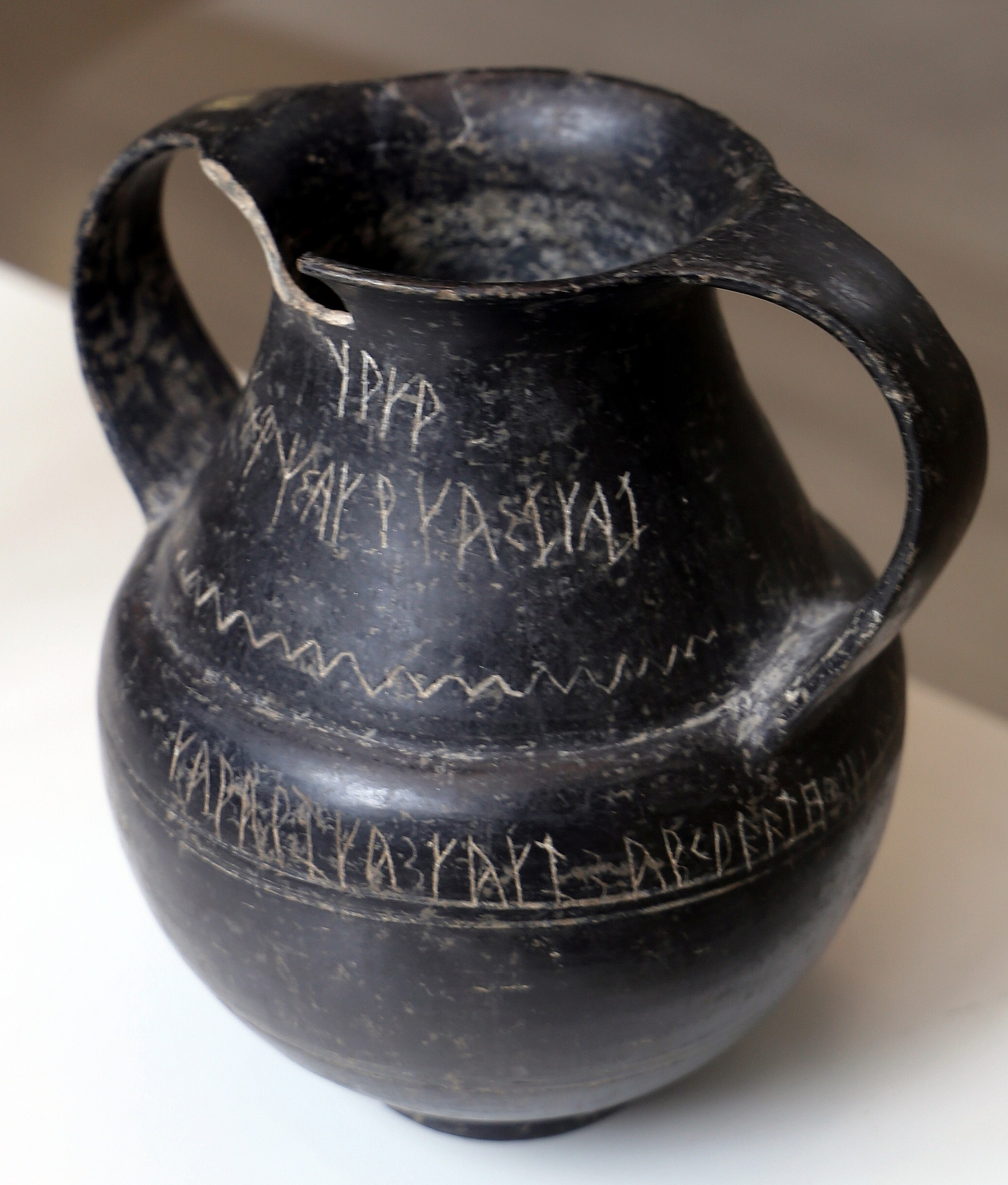 Museo nazionale etrusco di Villa Giulia This is a photo of a monument which is part of cultural heritage of Italy.